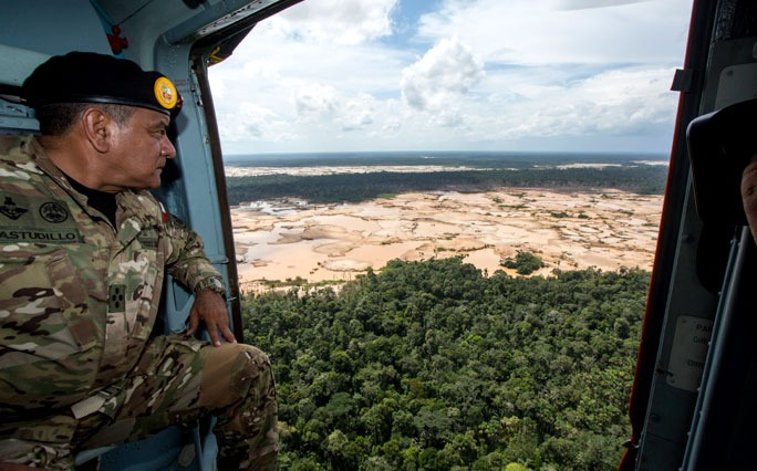 Fuerzas Especiales César Astudillo Cesar Astudillo Jefe del Comando Conjunto CCFFAA Fuerzas Armadas La Pampa